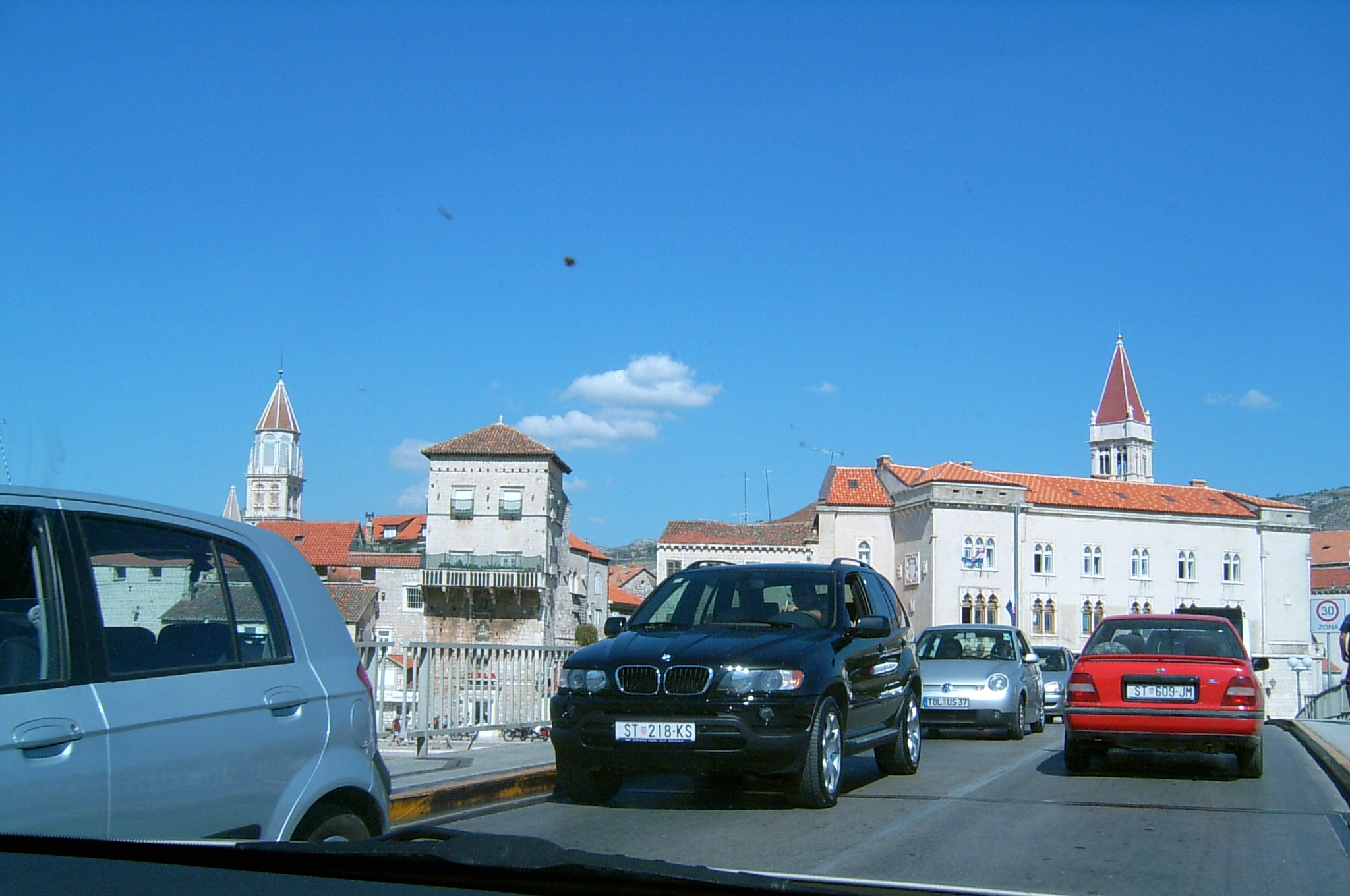 Chorwacja, Trogir